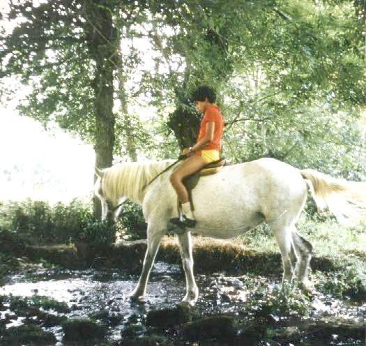 Traversée d'un ruisseau date et lieu : Août 1972 en Poitou-Charentes en France Auteur : Jean Ducos